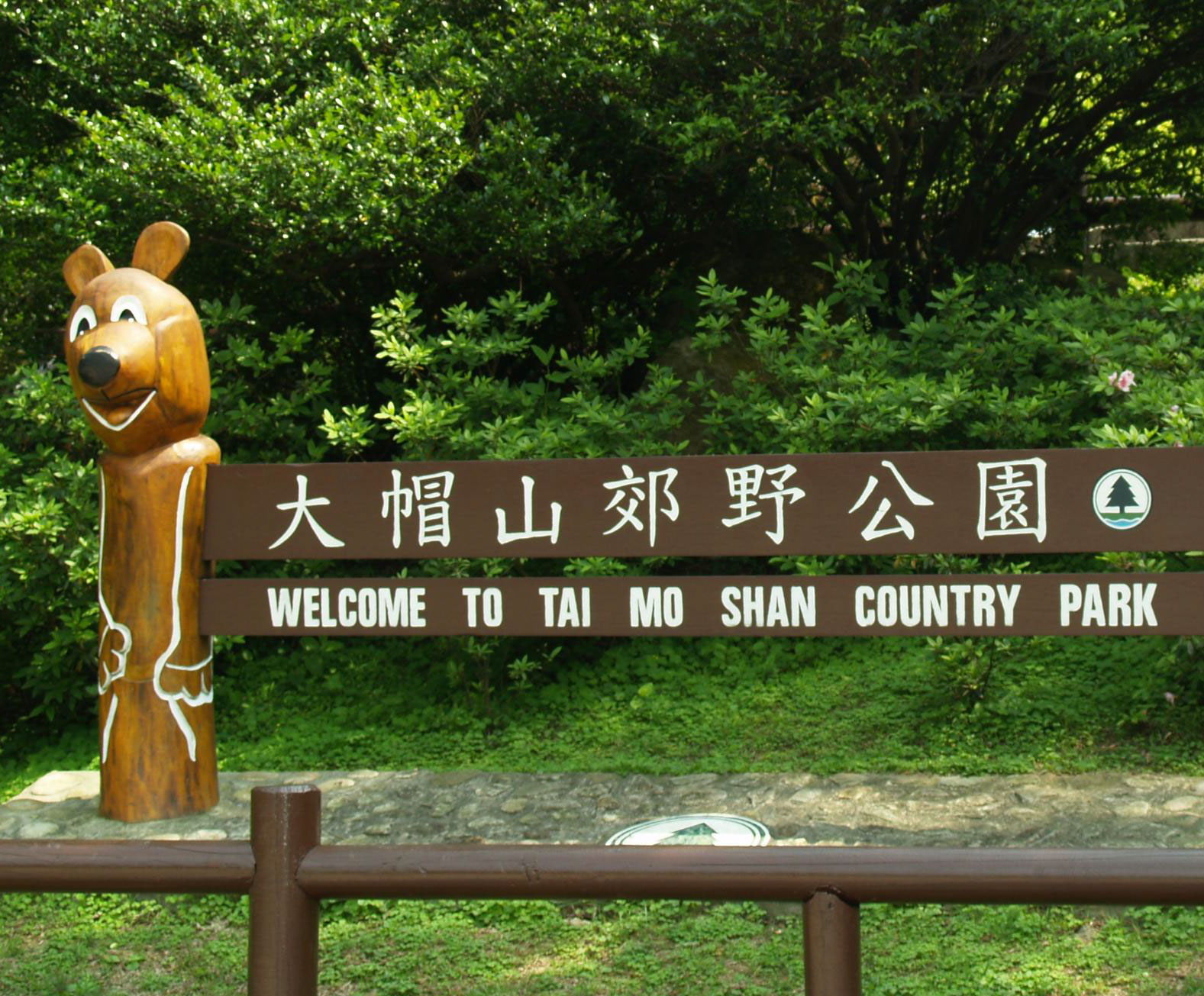 大帽山郊野公園